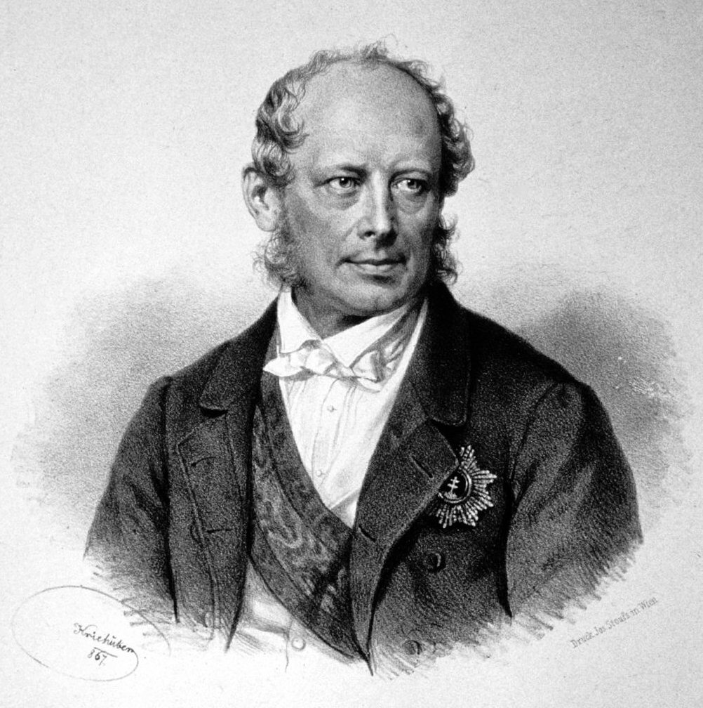 Friedrich Ferdinand Freiherr von Beust, Lithographie von Josef Kriehuber